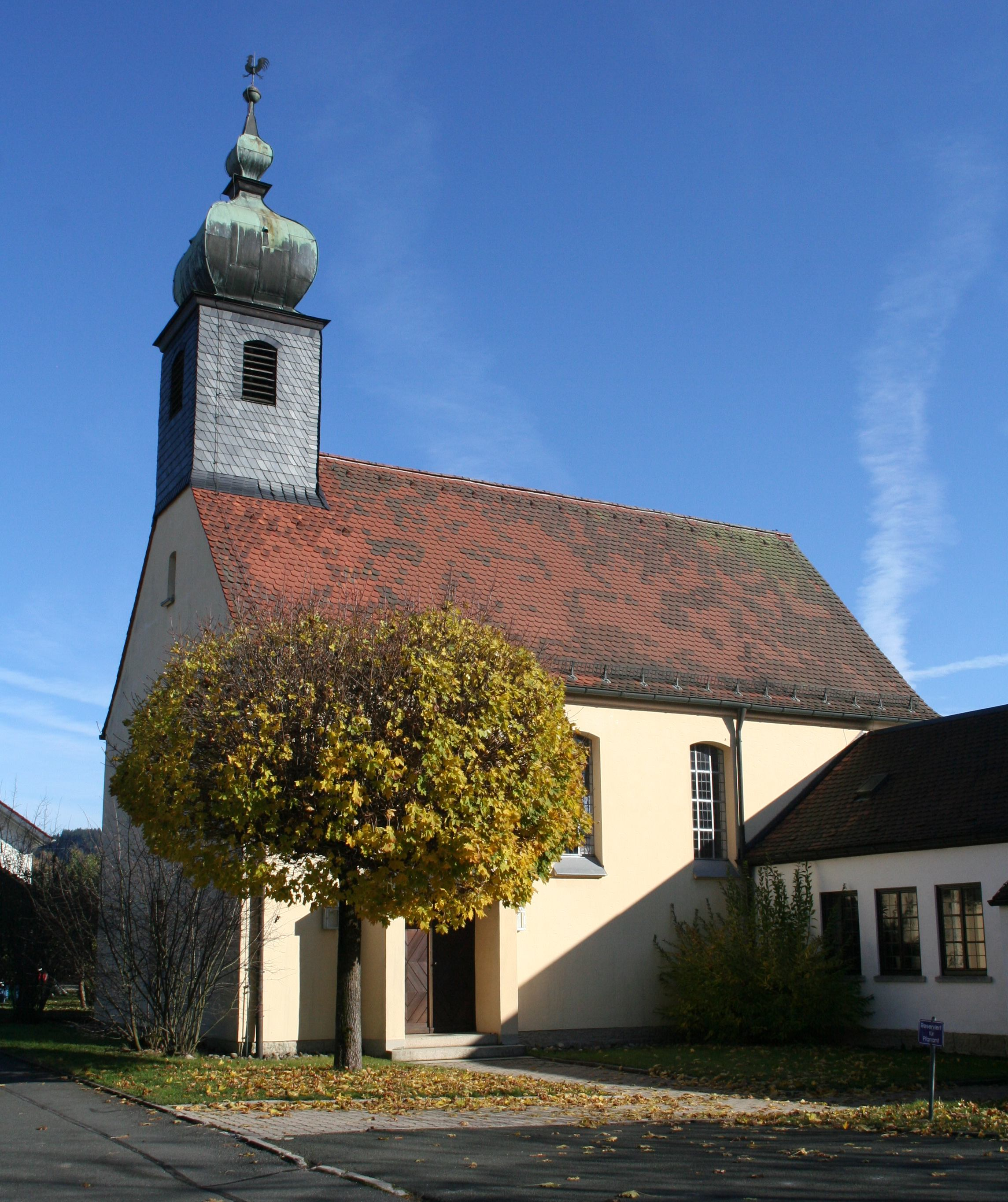 Evangelische Auferstehungskirche in Stockheim in Oberfranken (1954, Architekt Reinhard Claaßen)